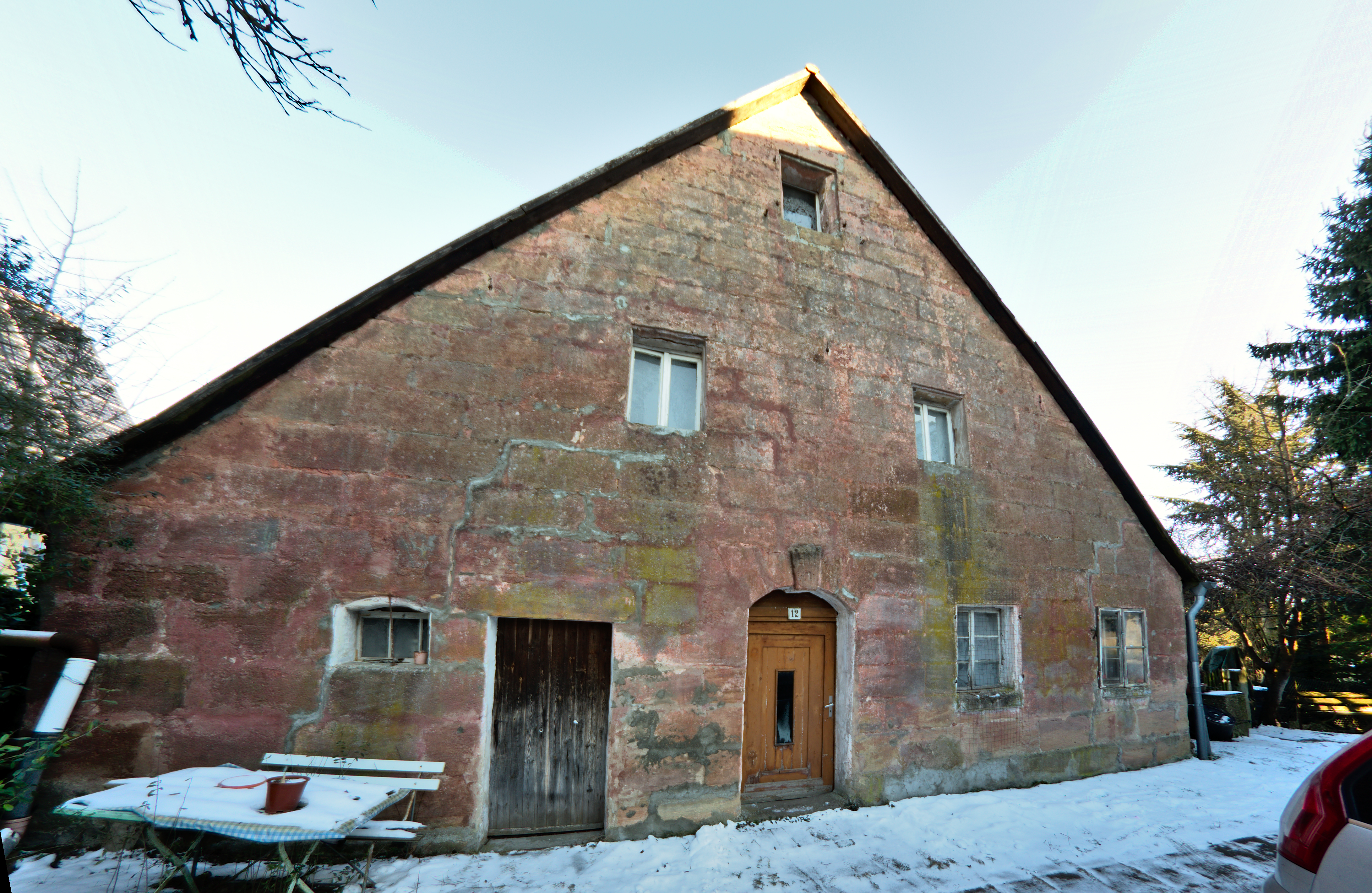 Sandsteinquaderbau und Fachwerk, Steildach, bezeichnet „1768“